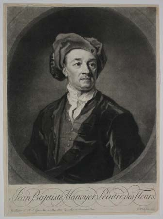 Portrait de Jean-Baptiste Monnoyer, gravure en manière noire de George White d'après Godfrey Kneller